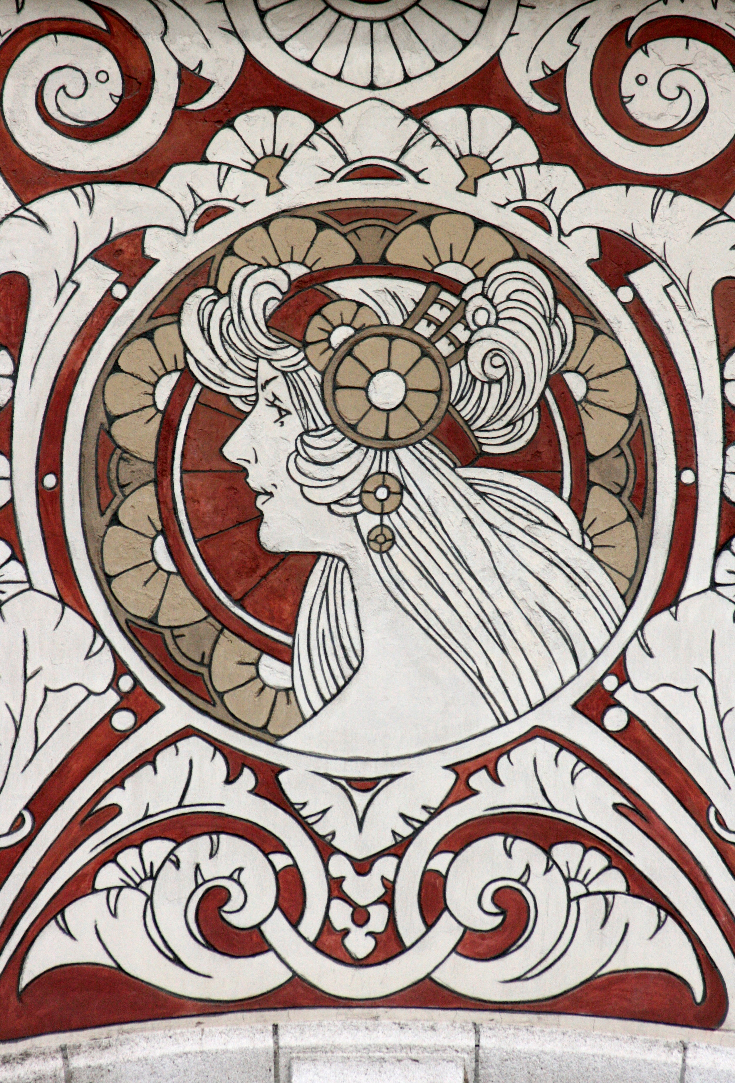 Rue Ernest-Laude 20, Schaerbeek (Bruxelles), Belgique. Architecte: Joseph Diongre (1908). Sgraffite de Privat Livemont (détail)